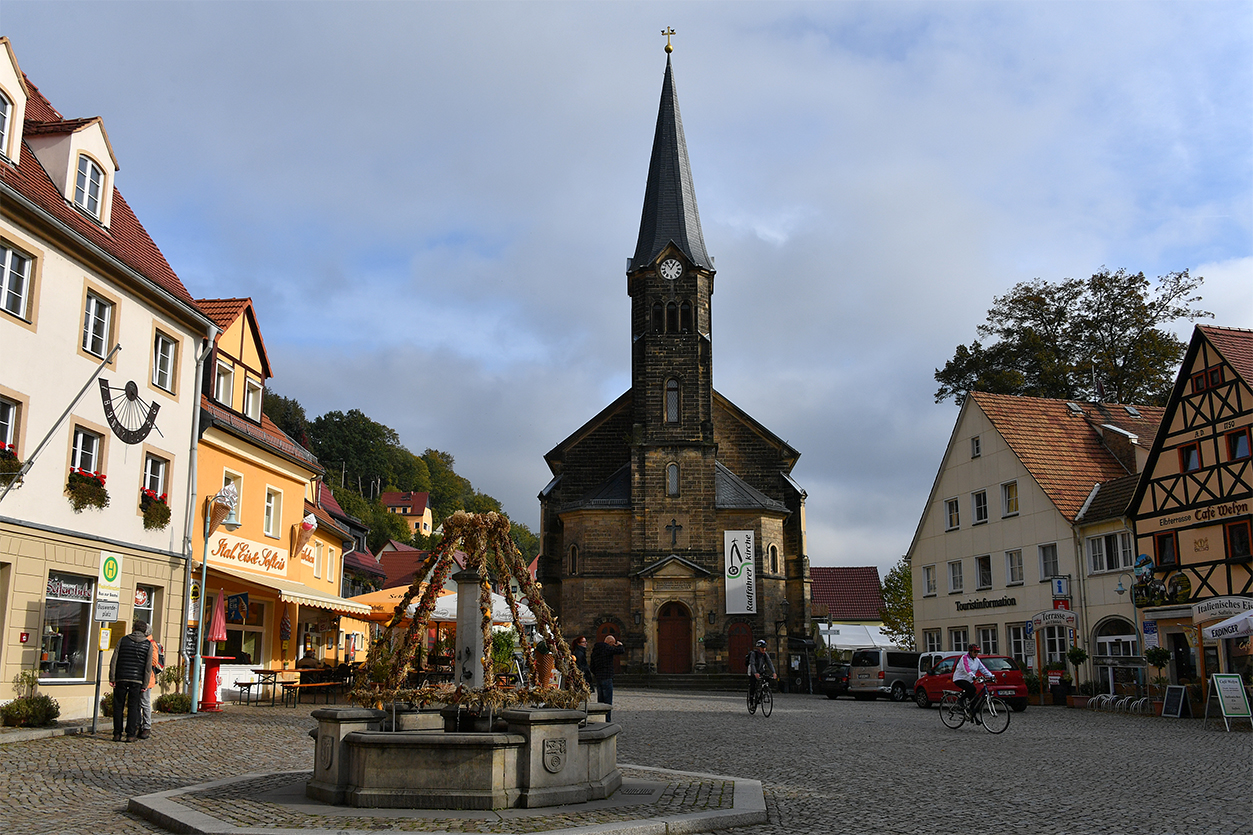 Stadt Wehlen Marktplatz und Radfahrerkirche